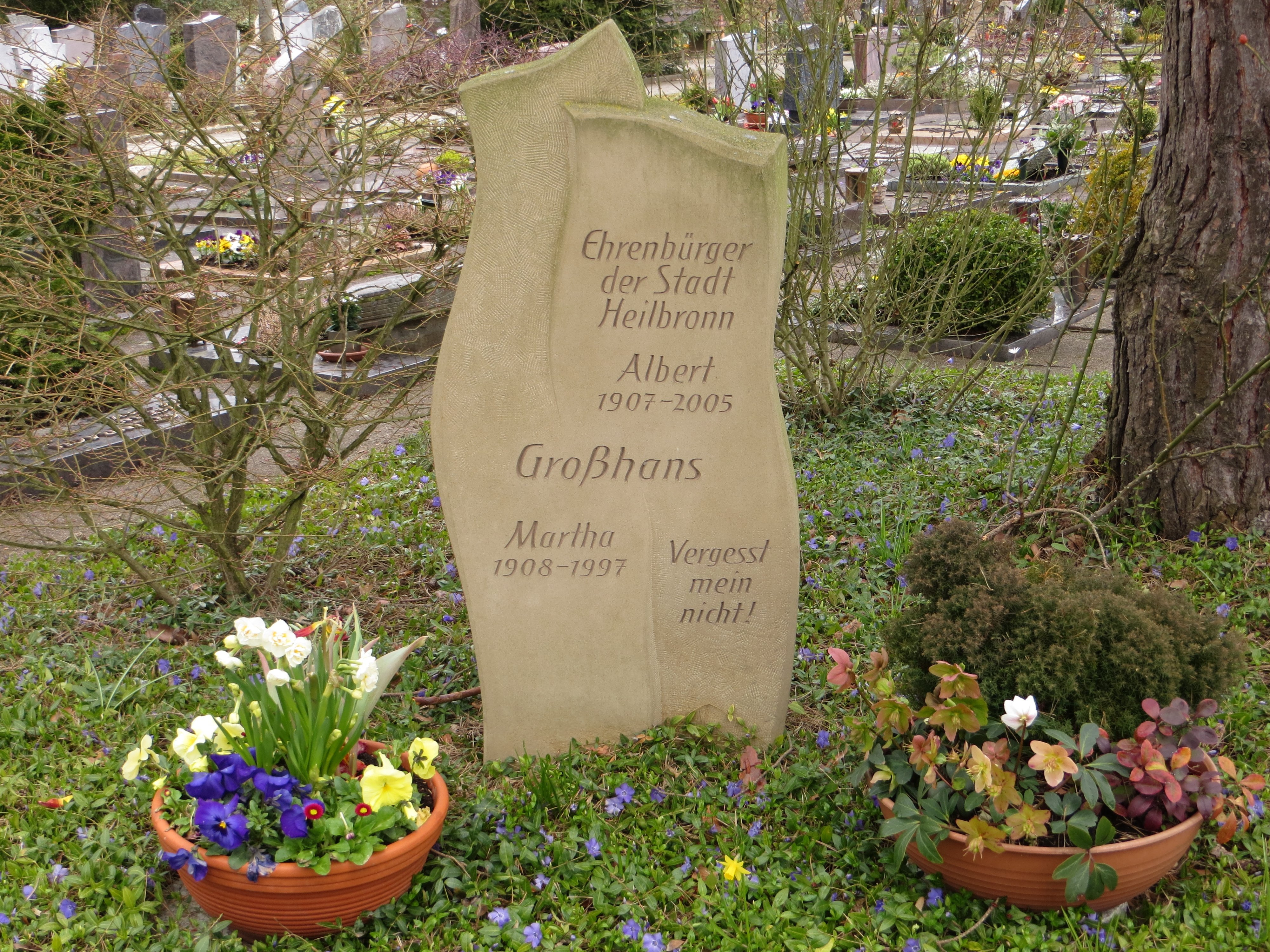 Grabstein des Heilbronner Ehrenbürgers Albert Großhans und seiner Frau Martha auf dem Heilbronner Südfriedhof in Sontheim